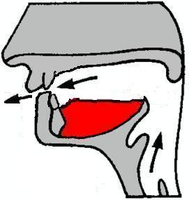 Labiodentaal fonetiek